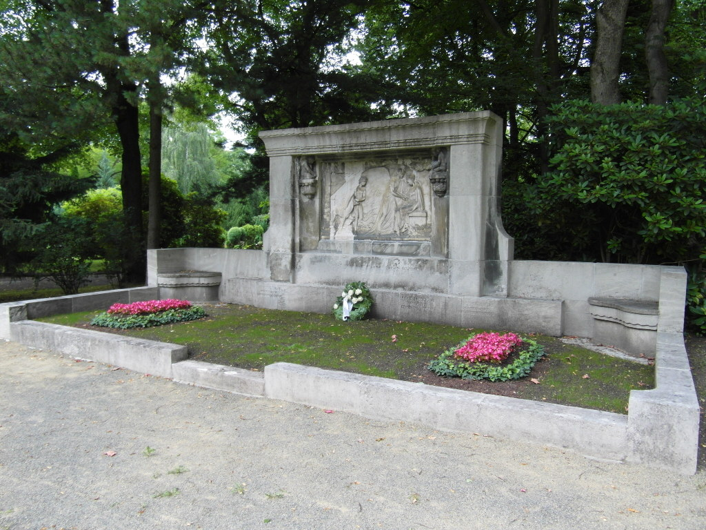 Restaurierte Grabstätte Familie Adolf Lehnert mit Bepflanzung nach historischem Vorbild